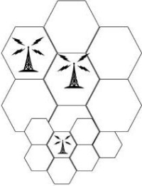 Հեքսագոնալ բջիջներով ցանց